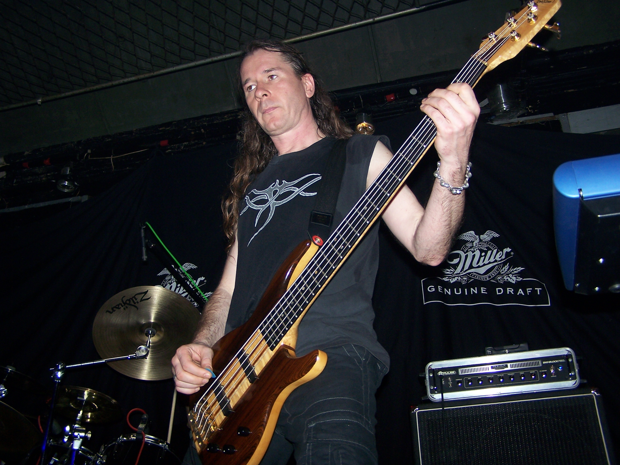 Krzysztof Najman - grający na gitarze basowej w zespole Closterkeller podczas koncertu w katowickim Mega Clubie.